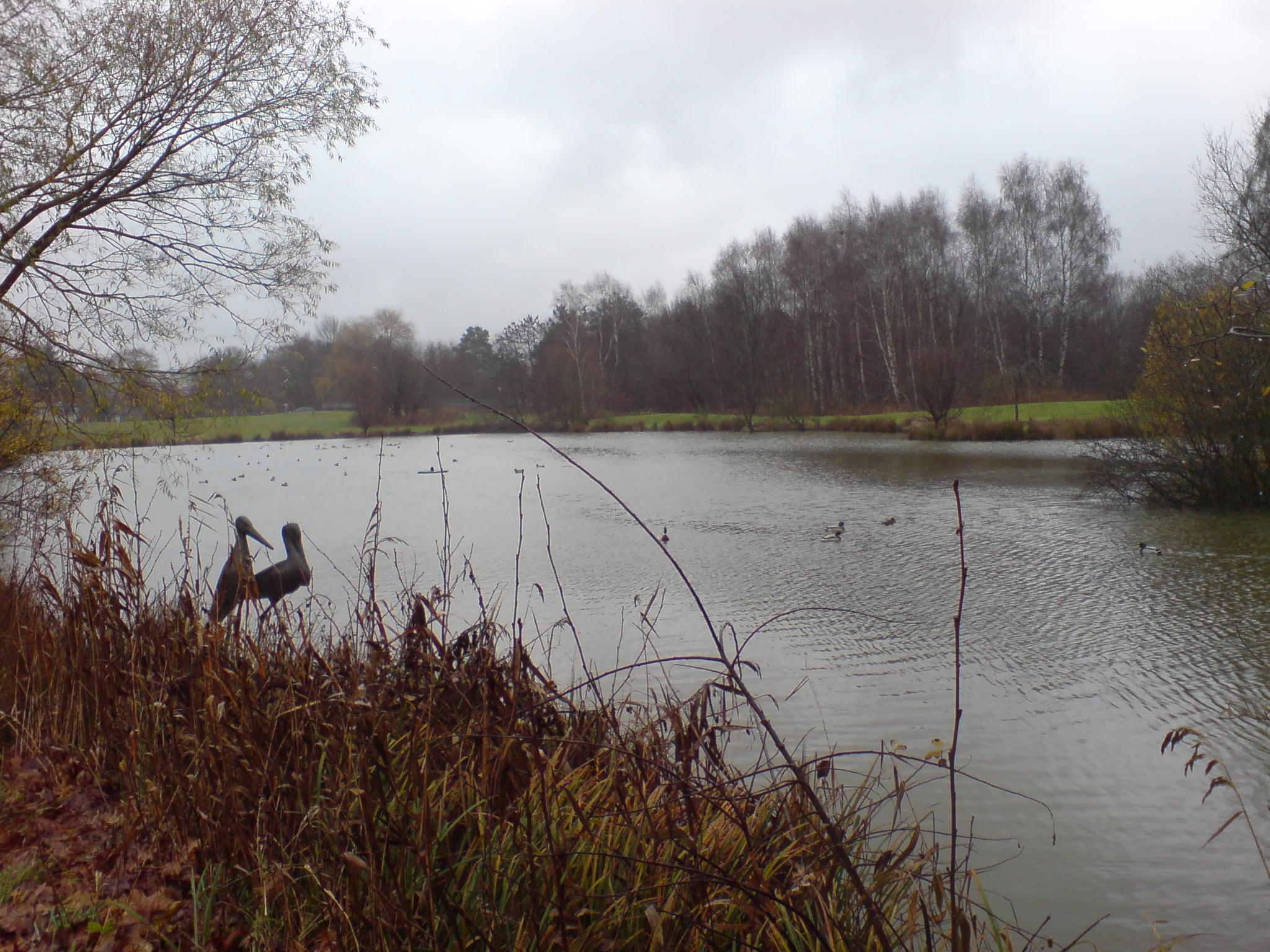 Der große Weiher im Stadtpark Homburg (Saar)